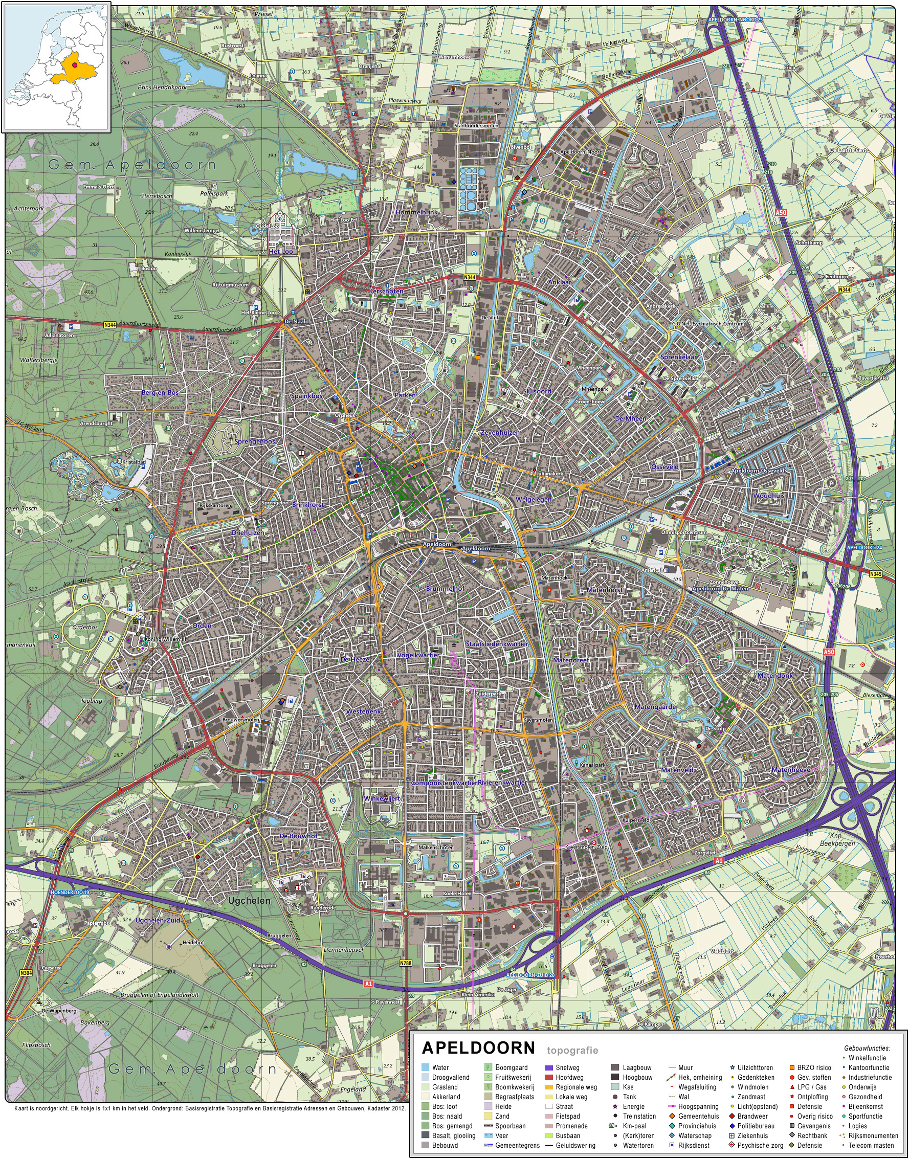 Topografisch beeld van de stad Apeldoorn. Op basis van de GML open geodata van de BRT/Top10NL (basisregistratie Topografie, Kadaster 2012), vrijgegeven door Kadaster op 30-11-2012 onder de Creative Commons BY licentie. Gebouwvlakken vanuit Open Geodata BAG extract (december 2012). Samenstelling en kleurenschema: Jan-Willem van Aalst, met QuantumGIS en Photoshop.